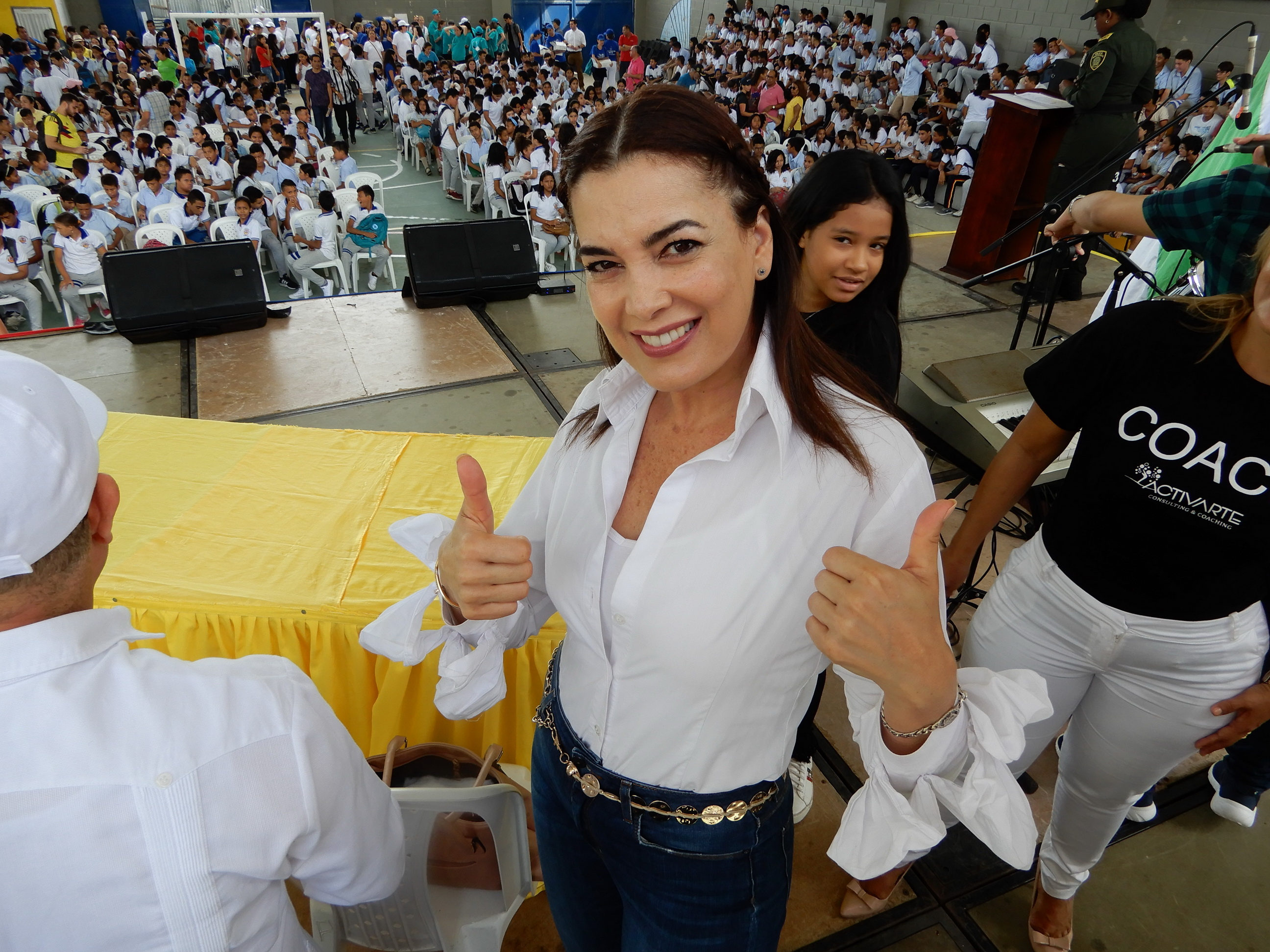 Ruddy Rodríguez tijdens een drugpreventiecampagne in Colombia